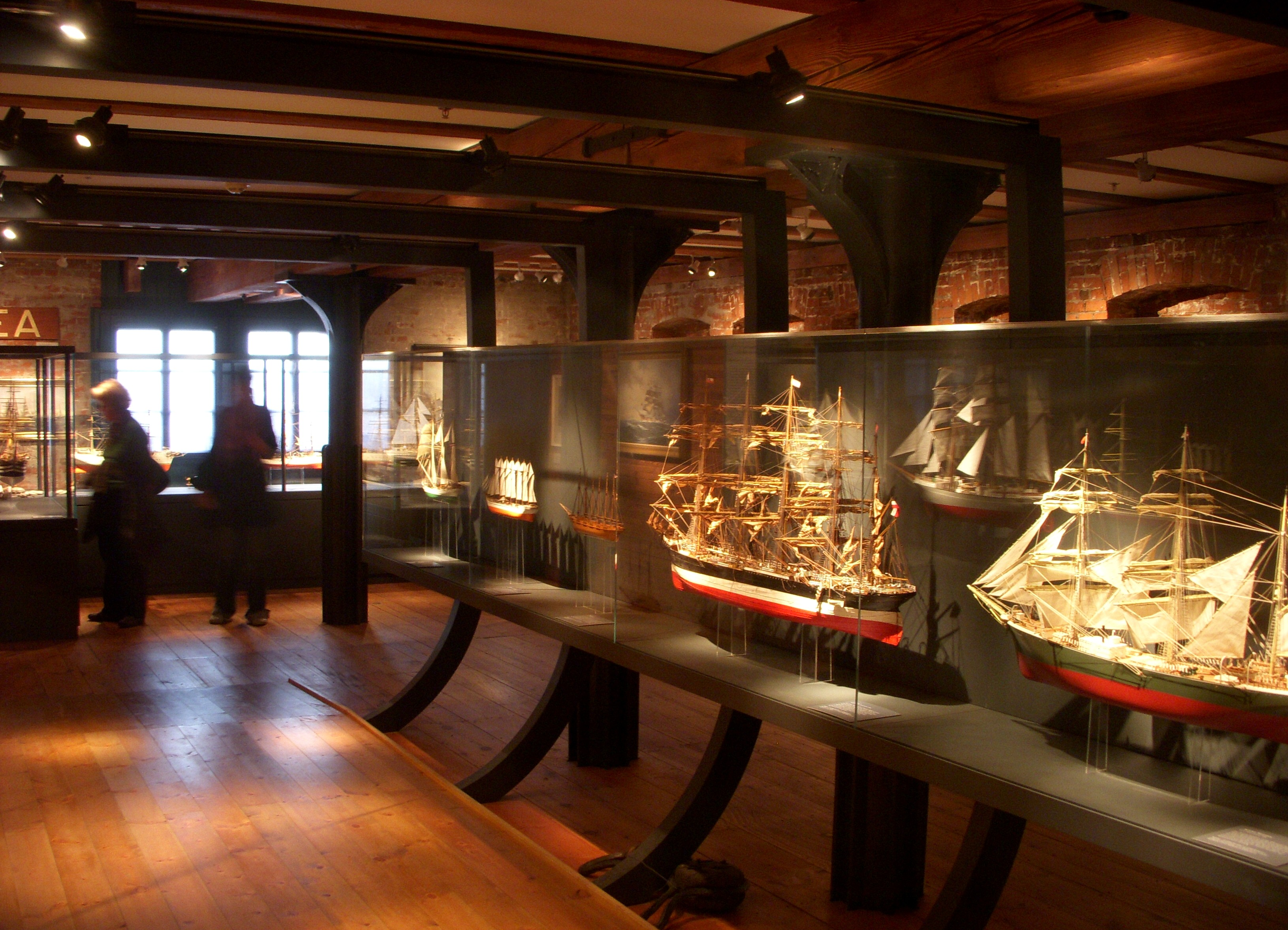 Maritimes Museum in Hamburg, Ausstellung